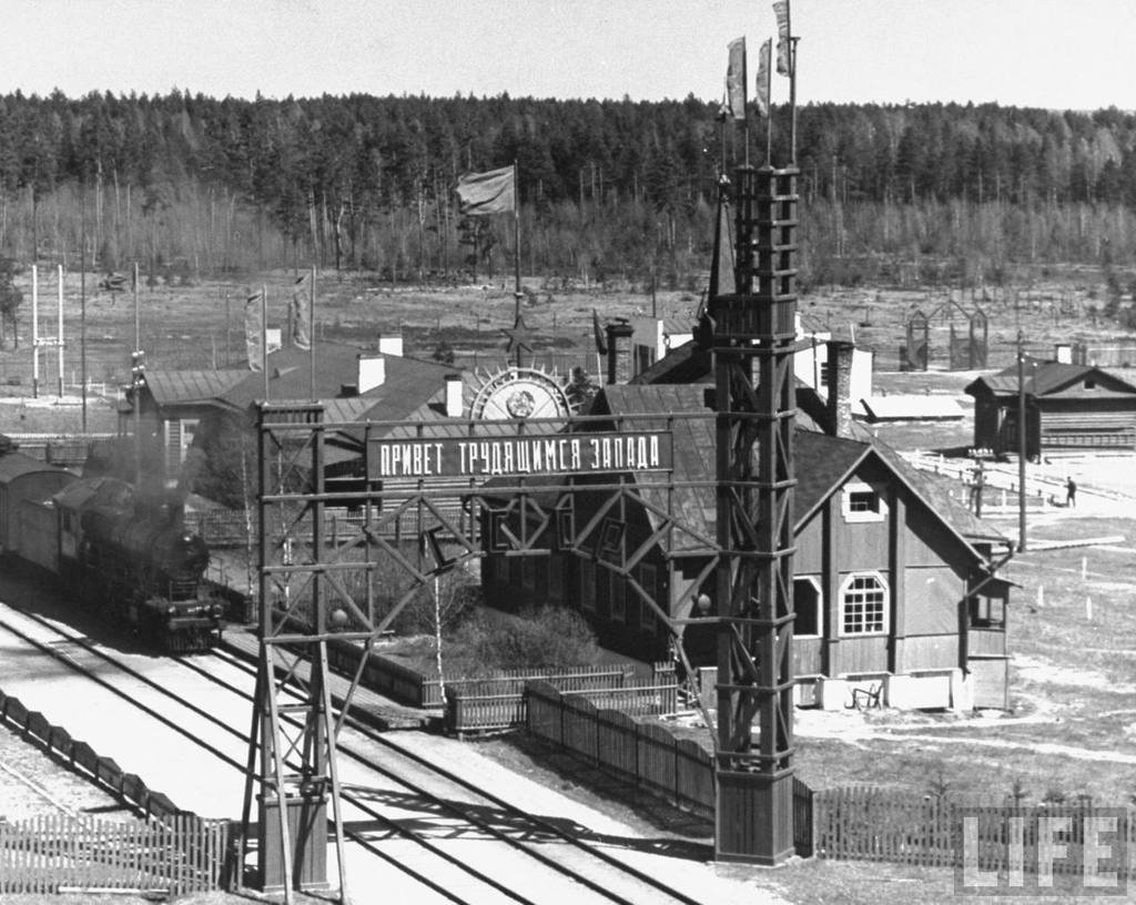 Беларуская (тарашкевіца): Негарэлае (Nieharełaje), Коласава (Kołasava). Брама